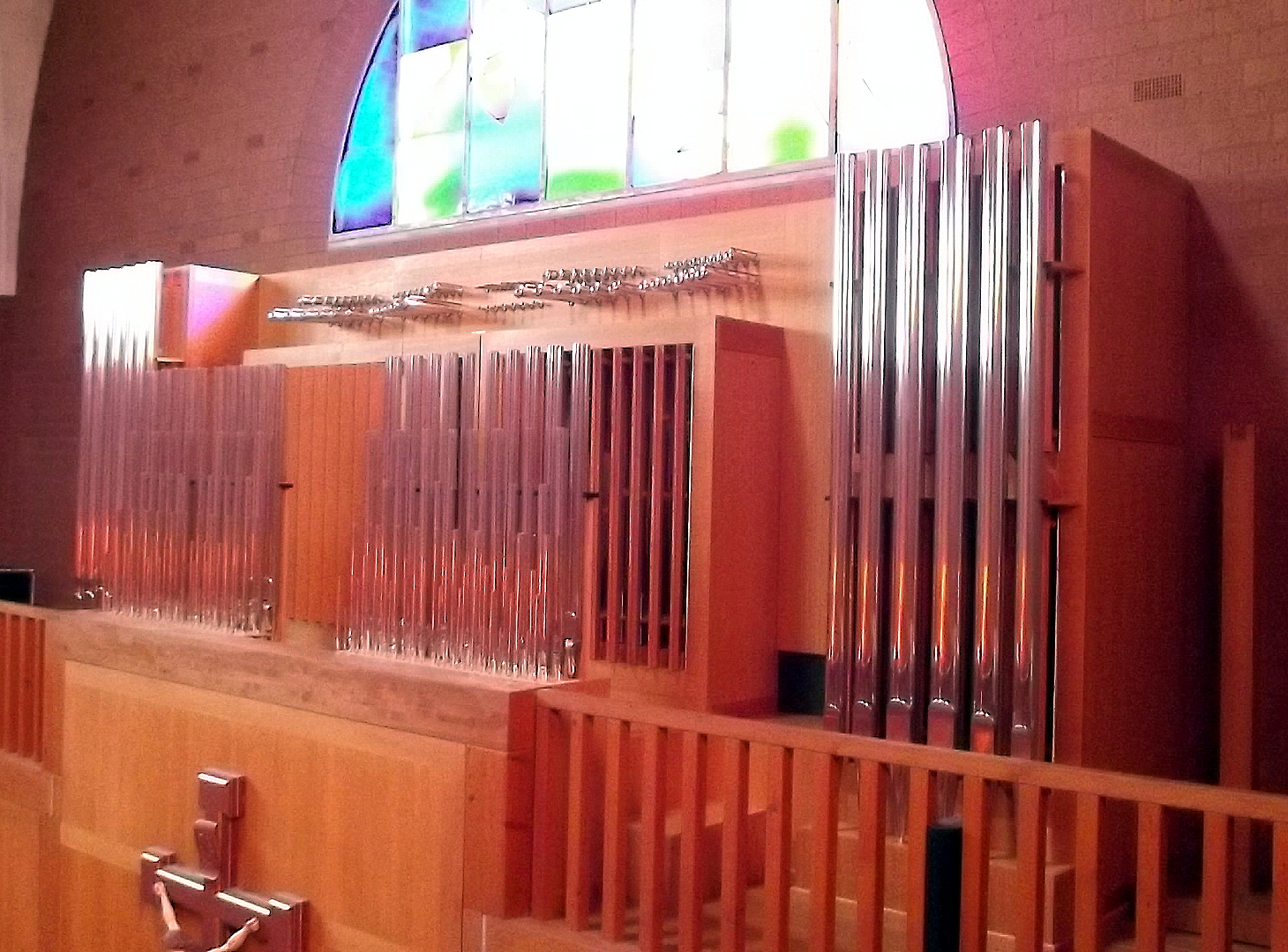 Hugo-Mayer-Orgel in Obersalbach